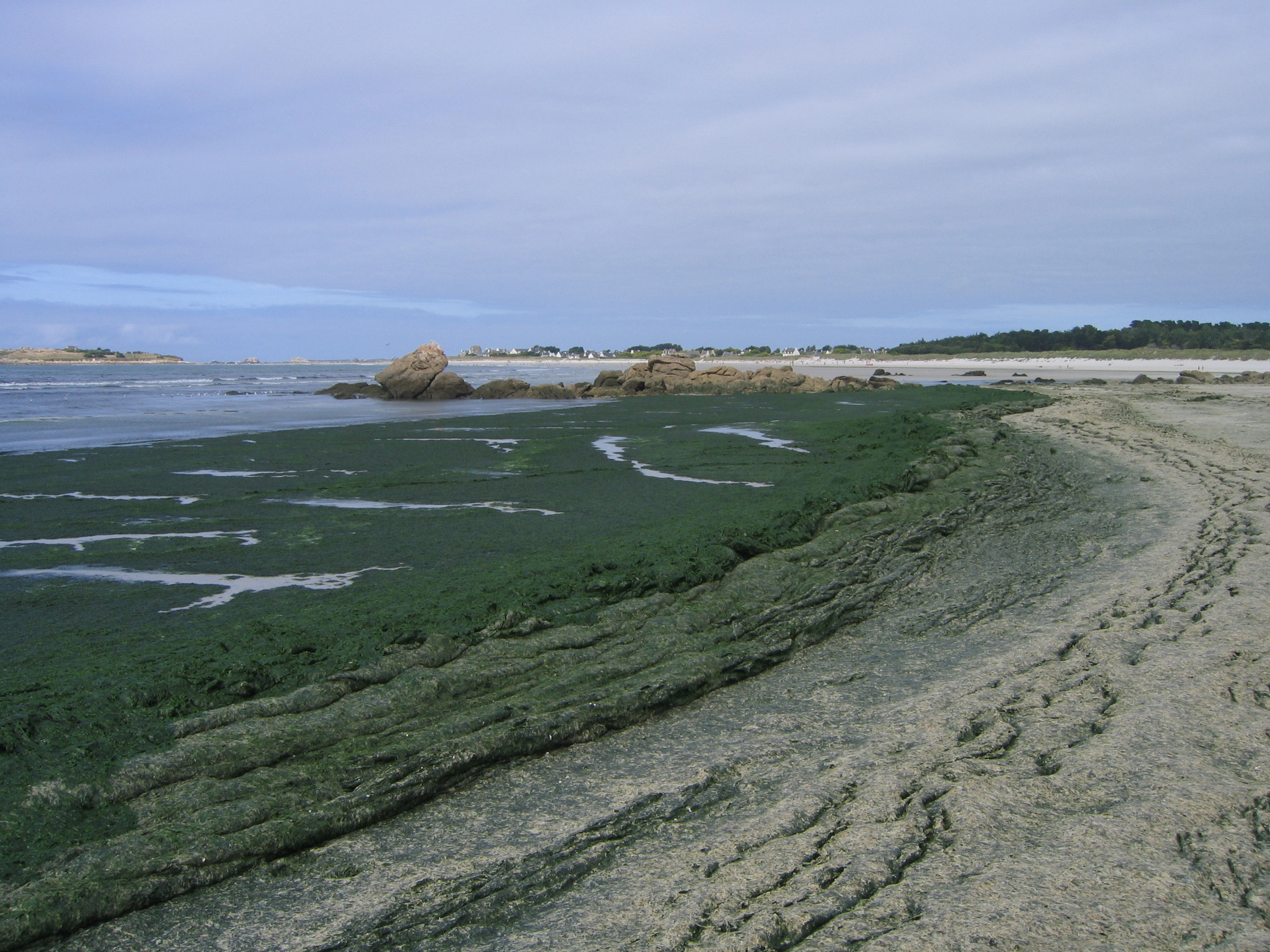 Des algues Ulva Armoricana lors d'une marée verte dans le nord Finistère